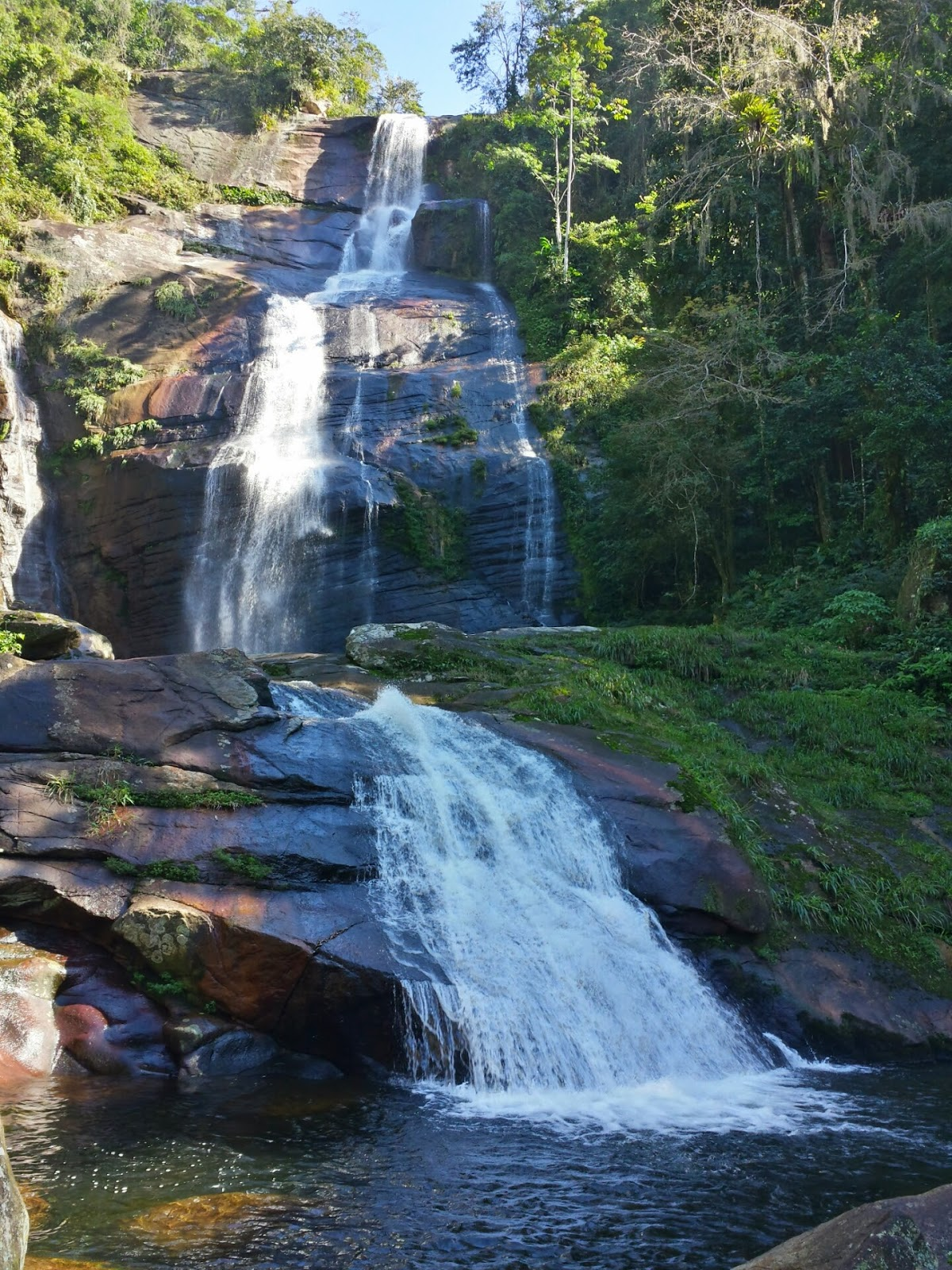 uma das muitas cachoeiras de Xerém